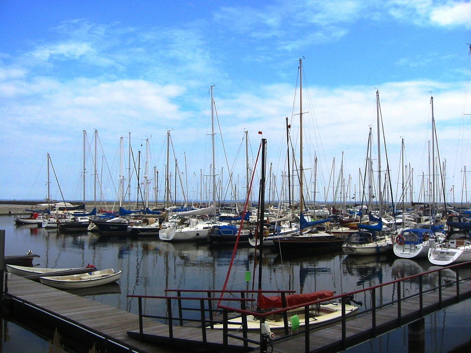 Impression von der Marina Lubmin in Lubmin, einer Gemeinde im Landkreis Ostvorpommern